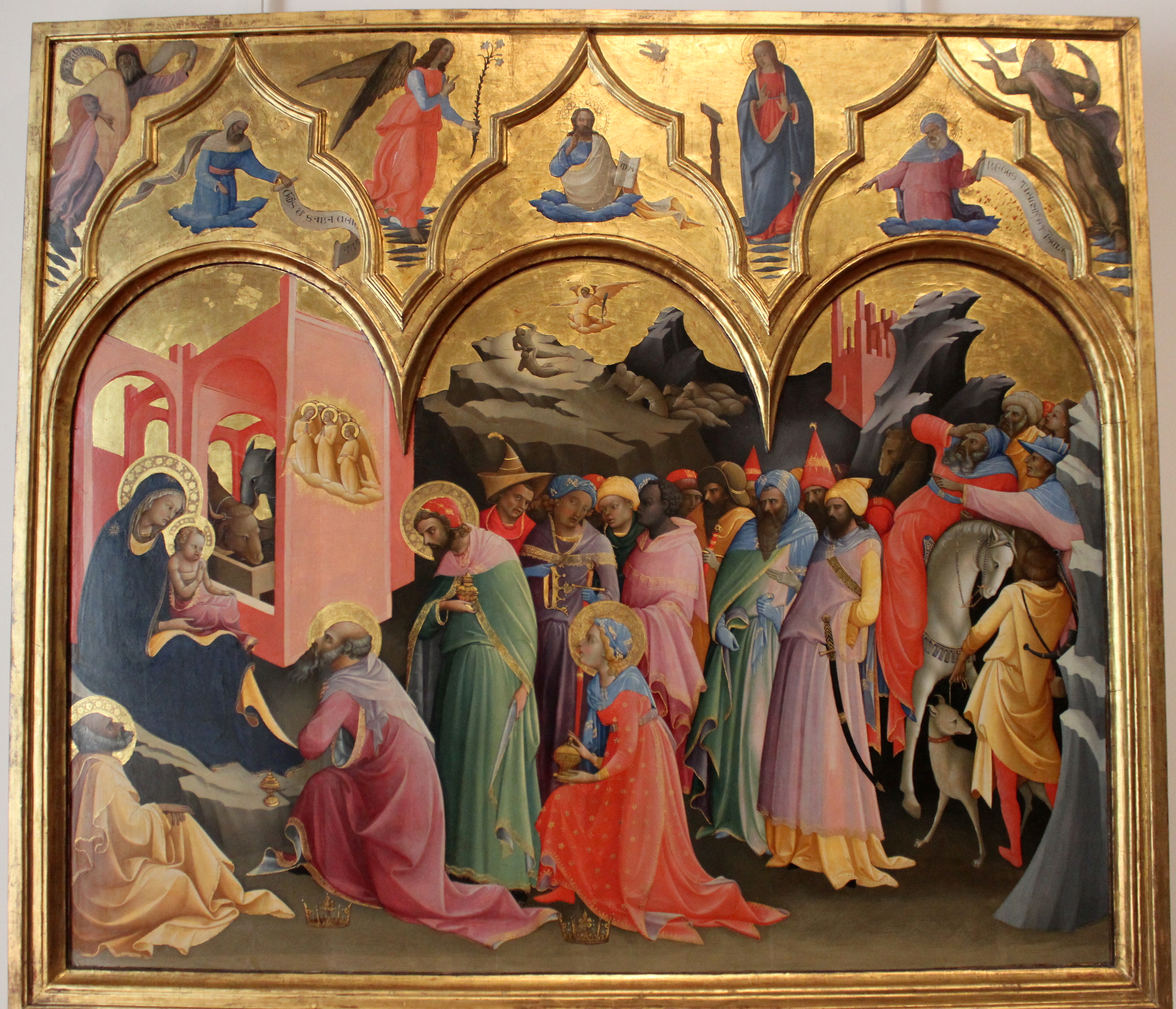 Lorenzo Monaco. Epifanía. Florencia, Uffizi.